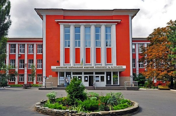 ДонНМУ